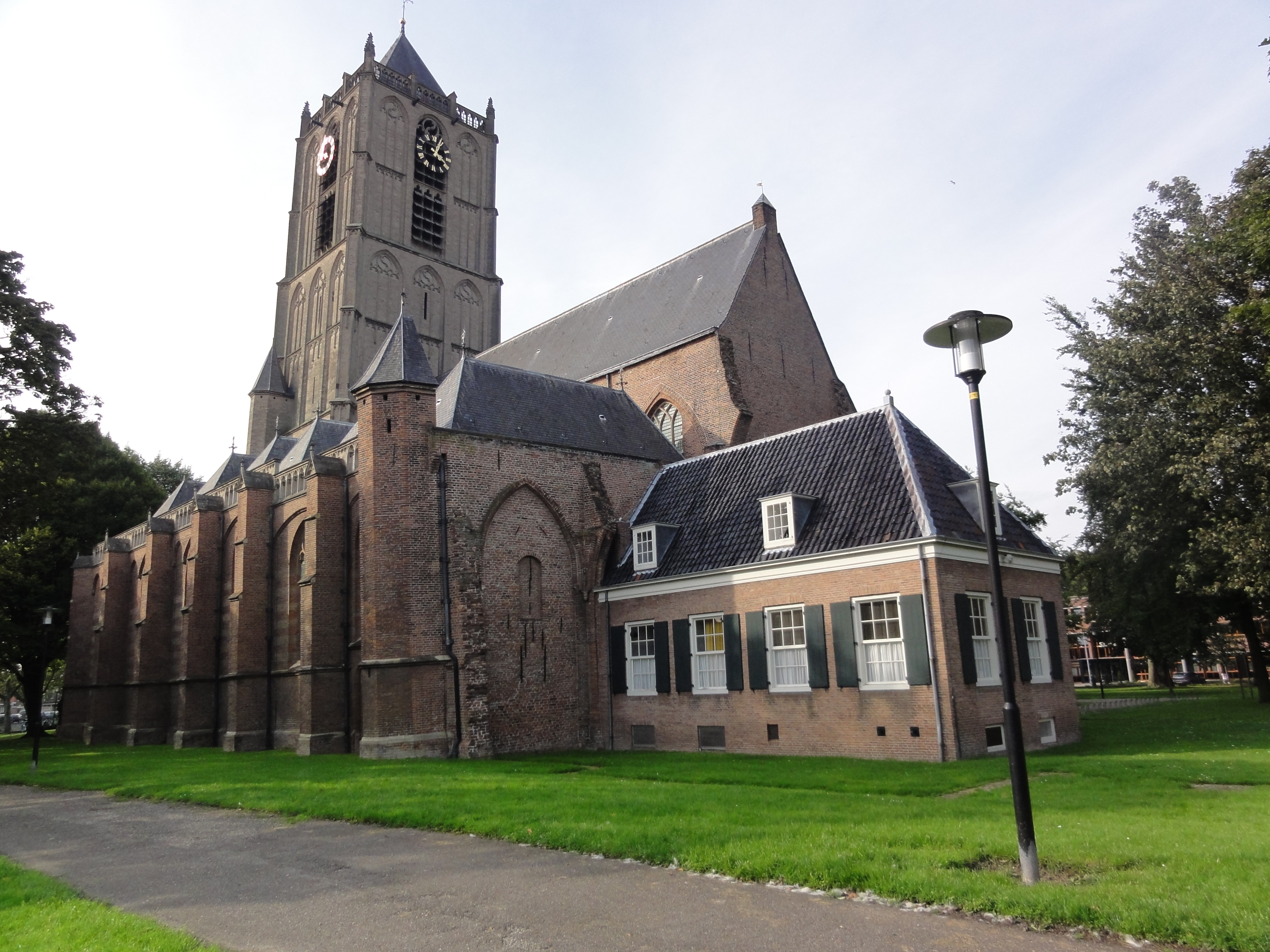 Tiel Rijksmonument 35568 Grote of St.Maarten kerk 24″ N, 5° 26′ 01.14″ E